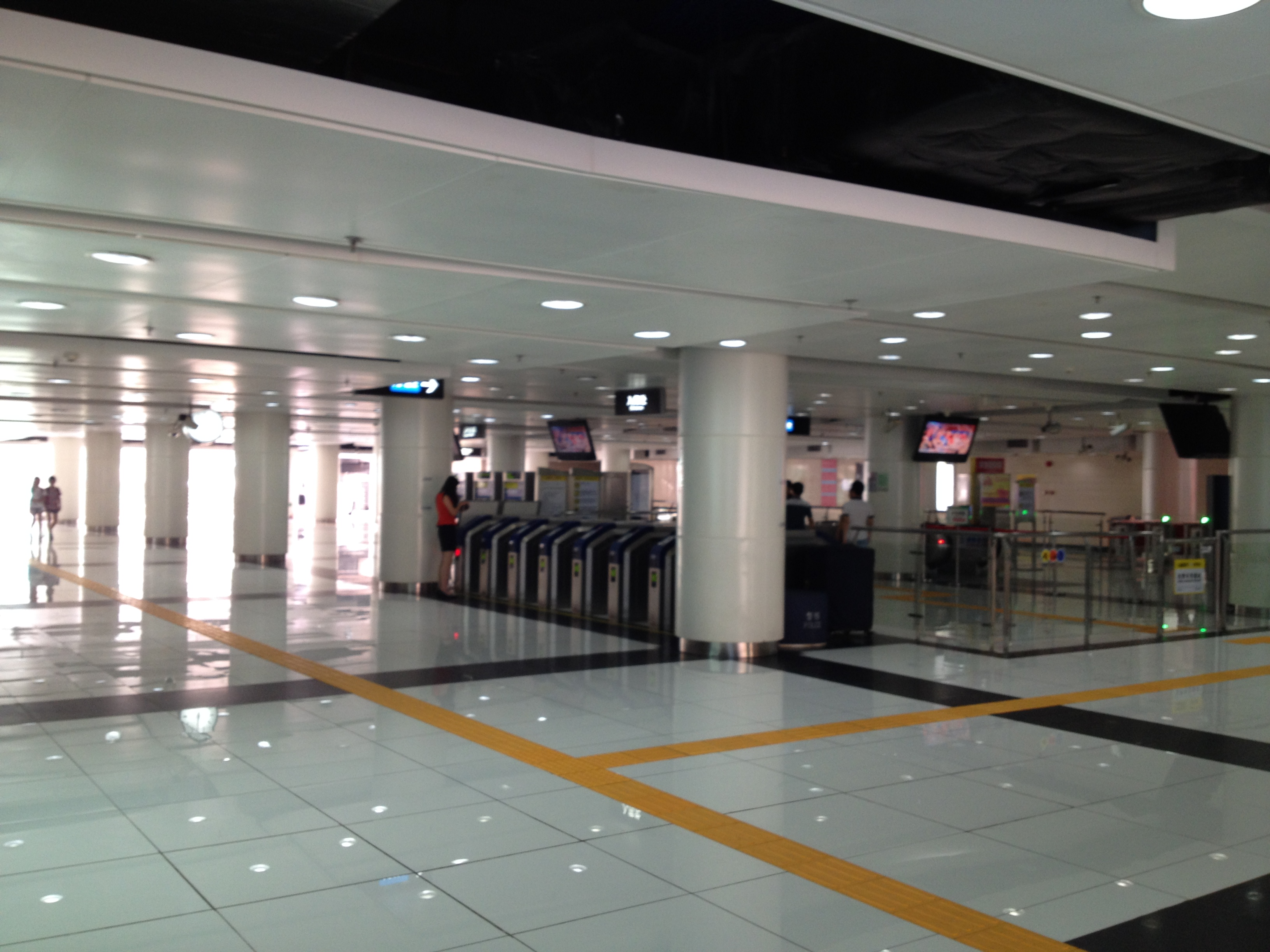 广州地铁花城大道站站厅